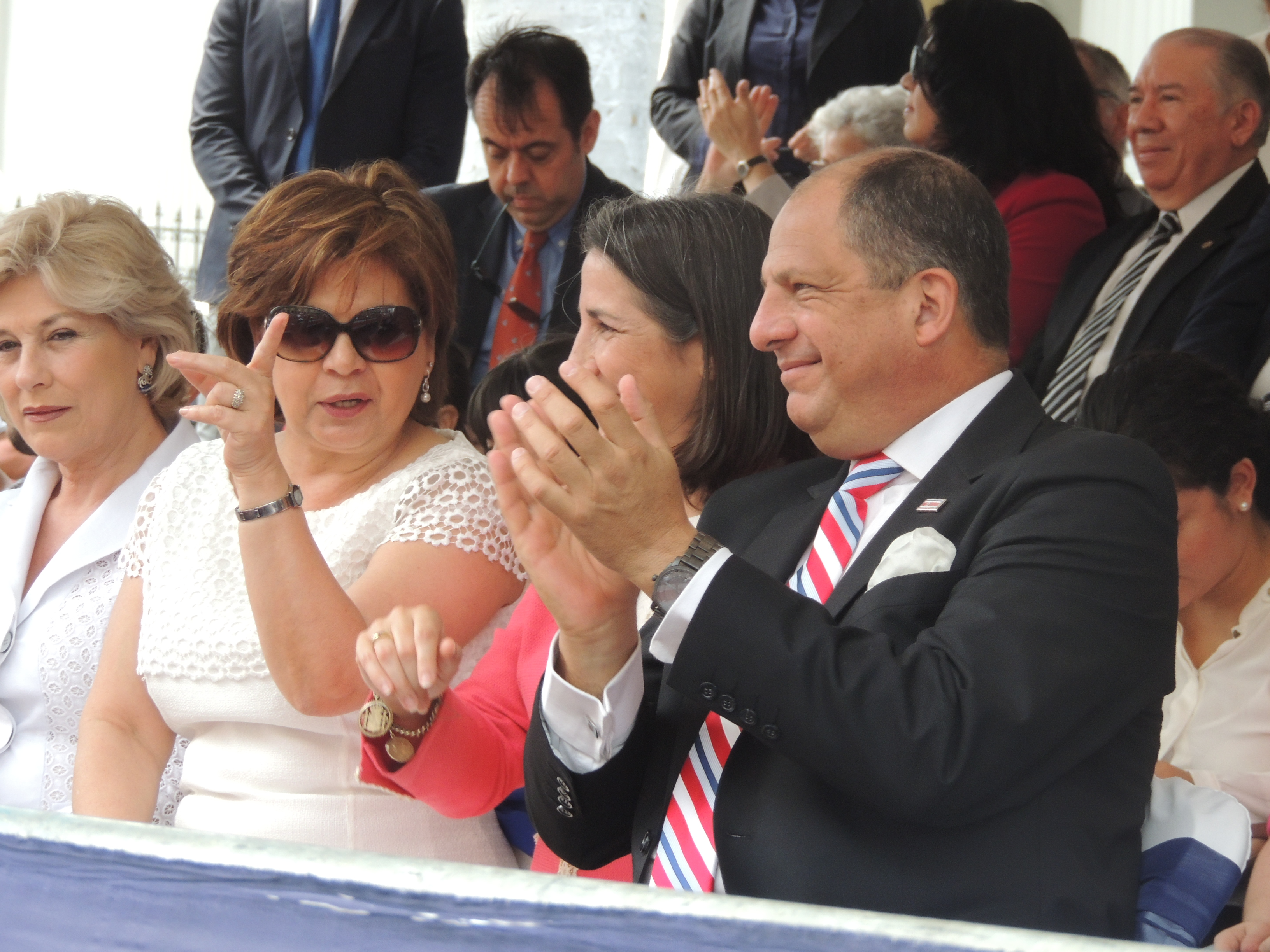 Luis Guillermo Solís, Presidente de Costa Rica